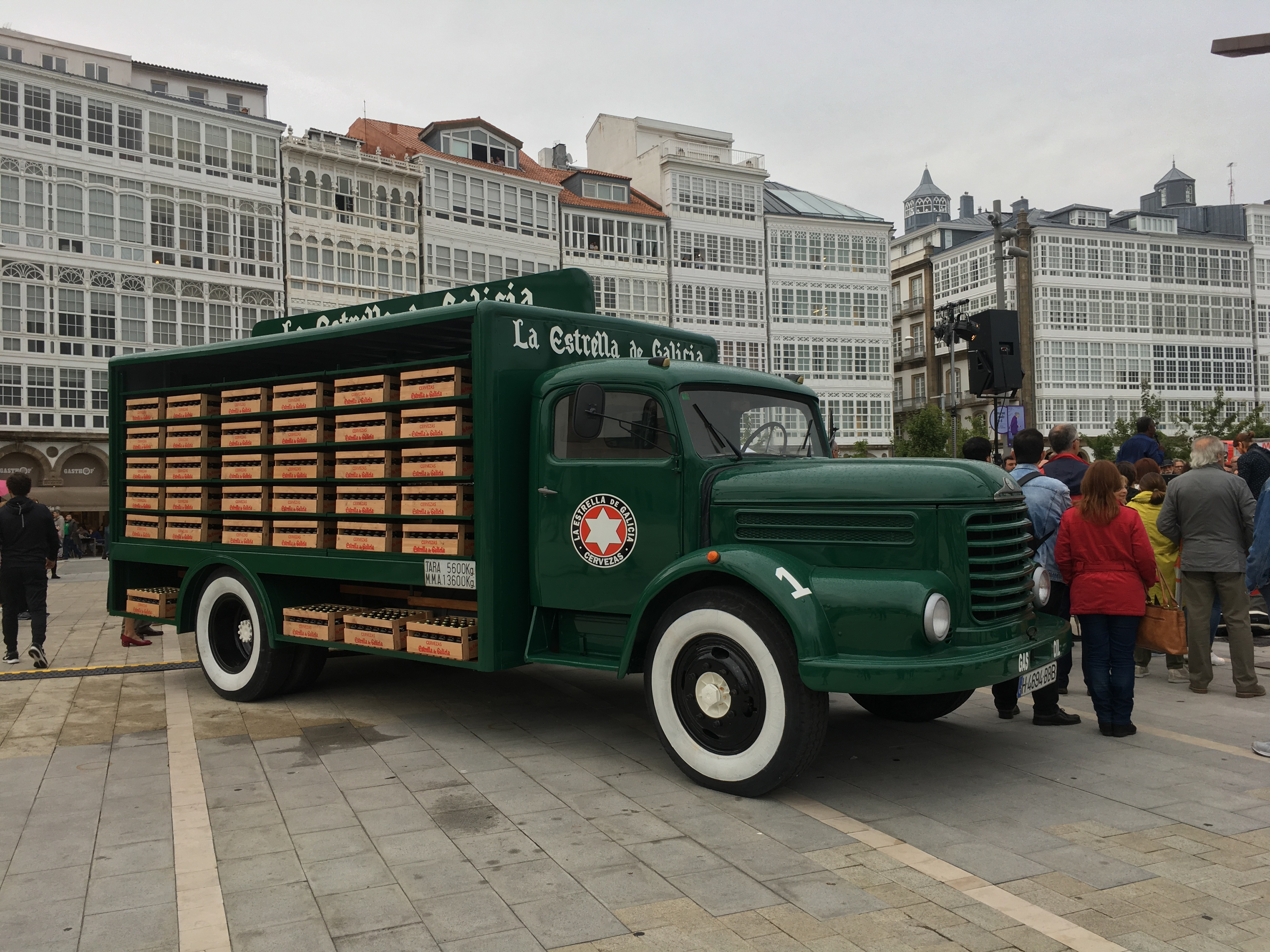 Antigo camión de reparto de Estrella Galicia na Coruña.